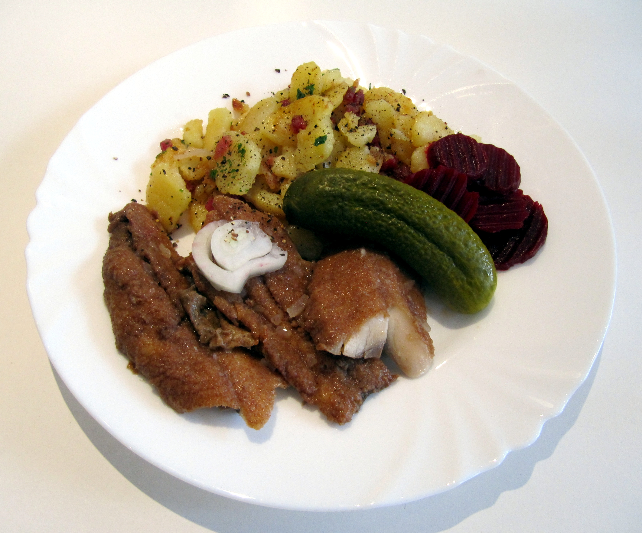 GT_Brathering_2